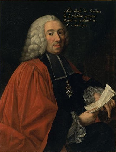 Portrait de Louis-René de Caradeux de la Chalotais (1701-1785), procureur général au parlement de Rennes.title QS:P1476,fr:"Portrait de Louis-René de Caradeux de la Chalotais (1701-1785), procureur général au parlement de Rennes." label QS:Lfr,"Portrait de Louis-René de Caradeux de la Chalotais (1701-1785), procureur général au parlement de Rennes."